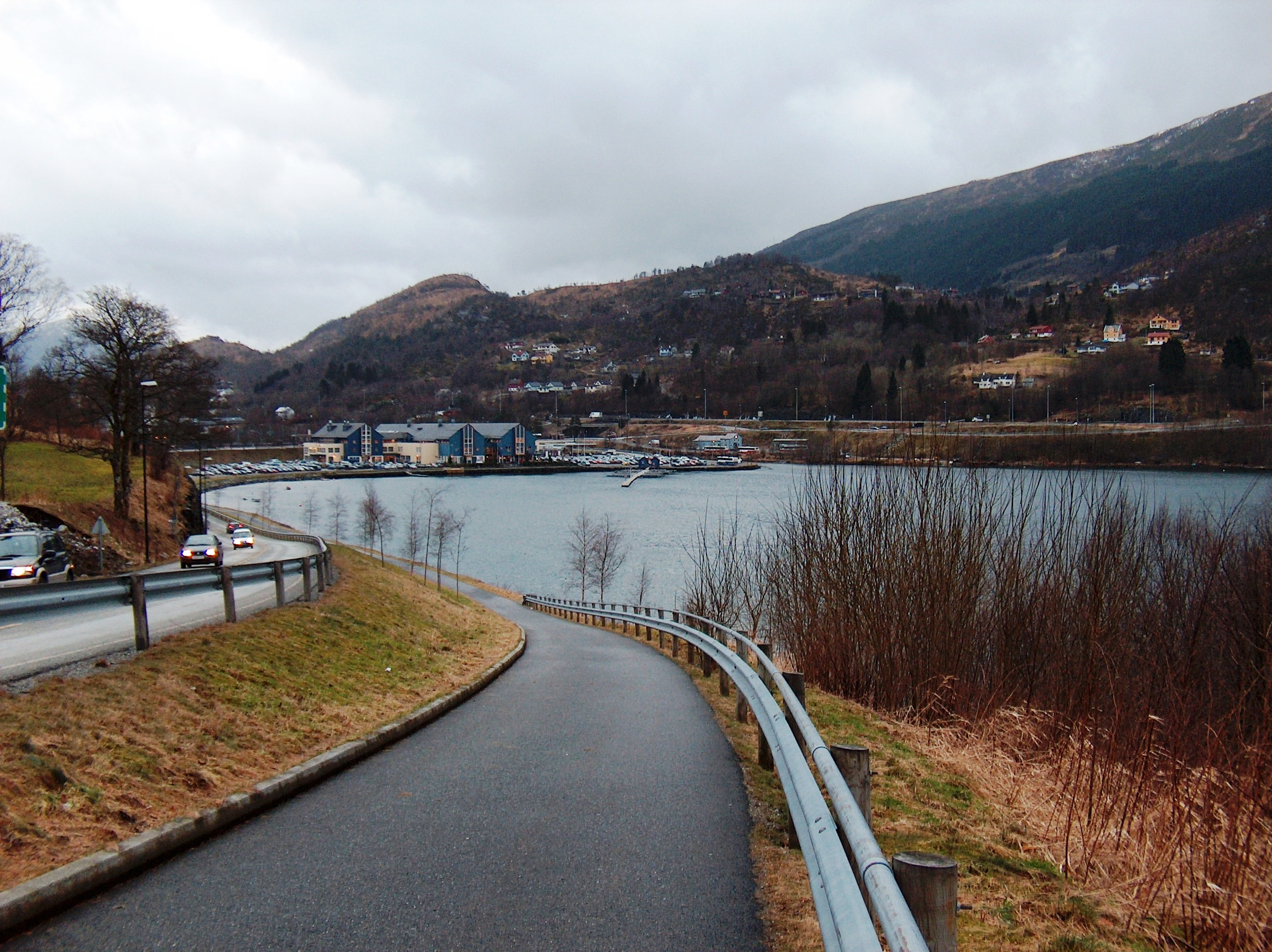 Arnavågen, Indre Arna, Bergen in Norway.